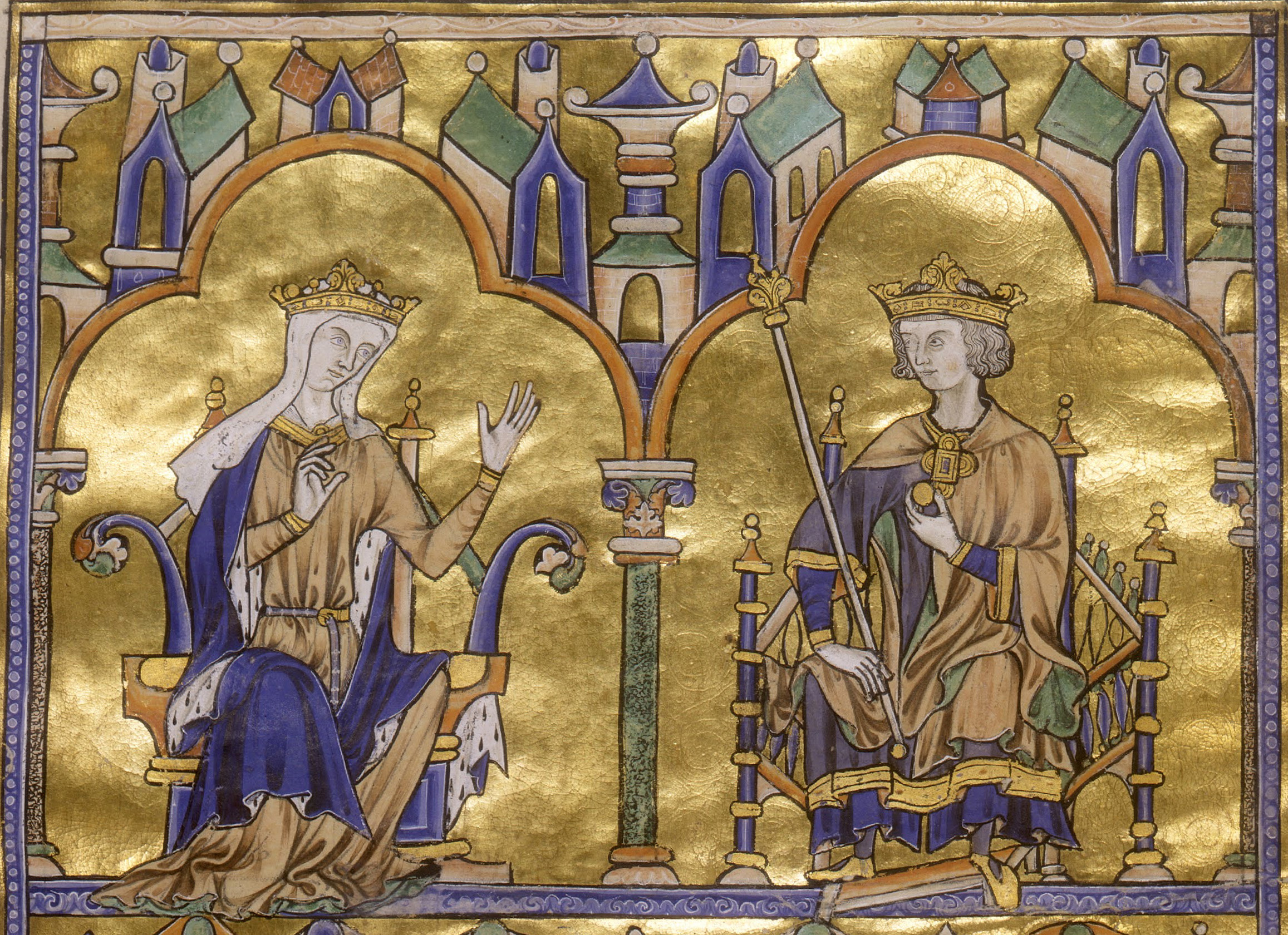 Détail d'une miniature représentant Blanche de Castille et le roi Louis IX dans la Bible moralisée de Tolède, dite bible de Saint Louis.